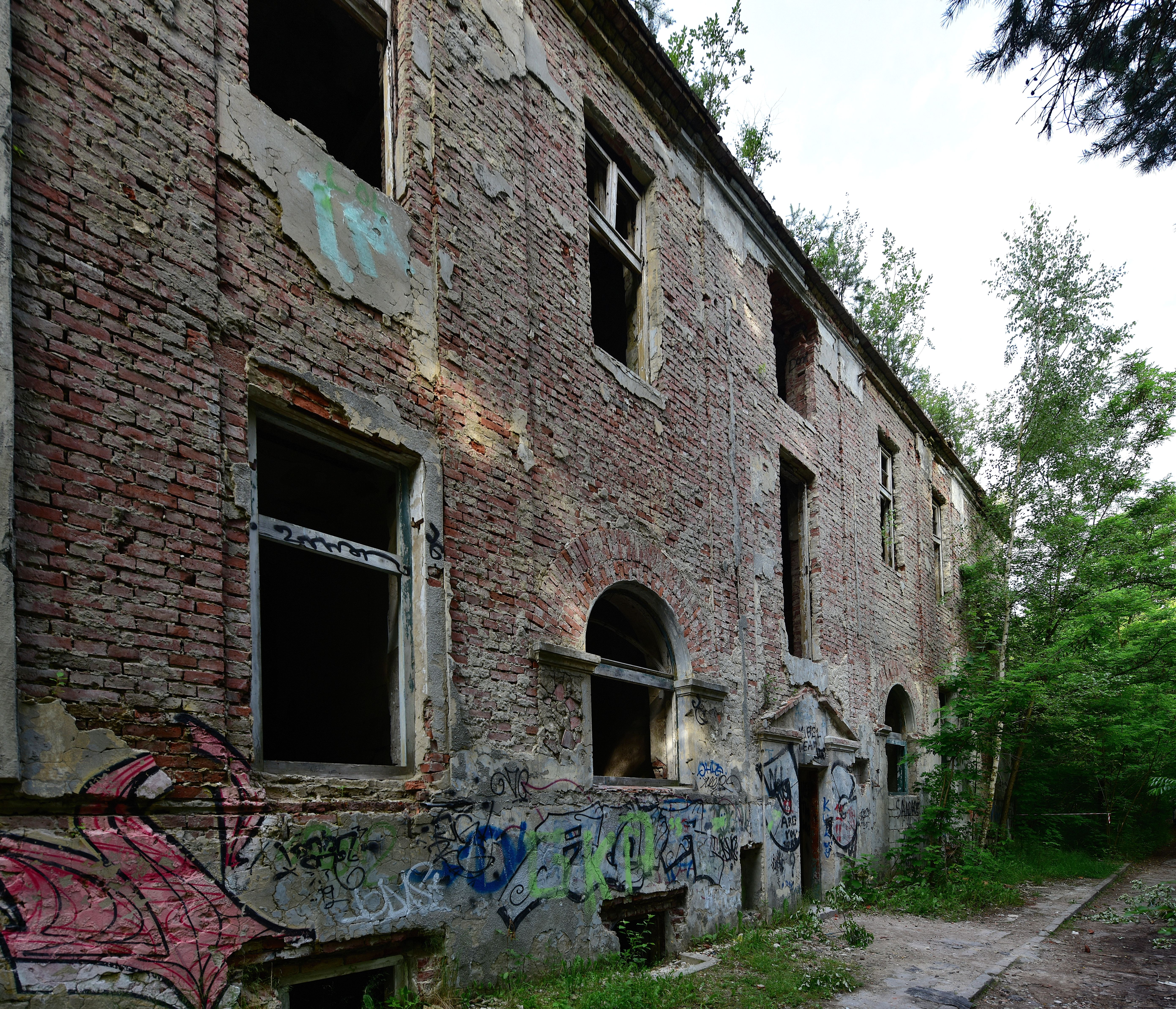 Jeden z budynków Zakładu dla Nerwowo i Psychicznie Chorych Żydów "Zofiówka" w Otwocku